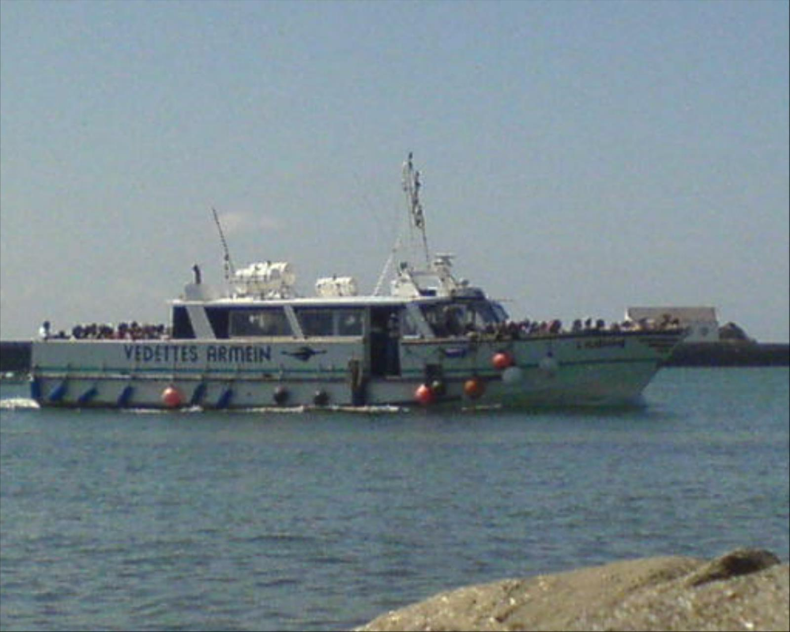 Vedette à passagers Ilienne